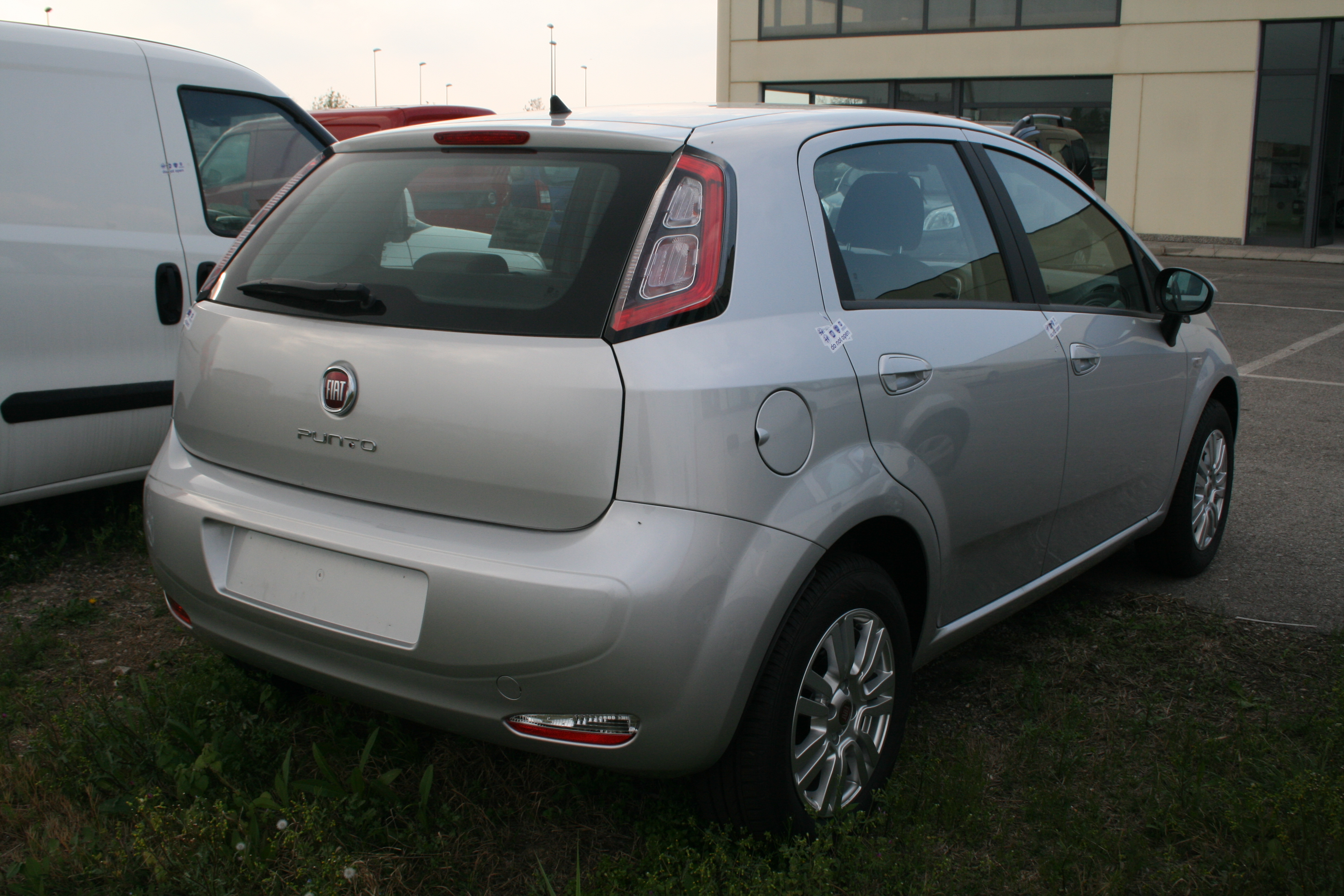 Una Fiat Punto 2012 grigia